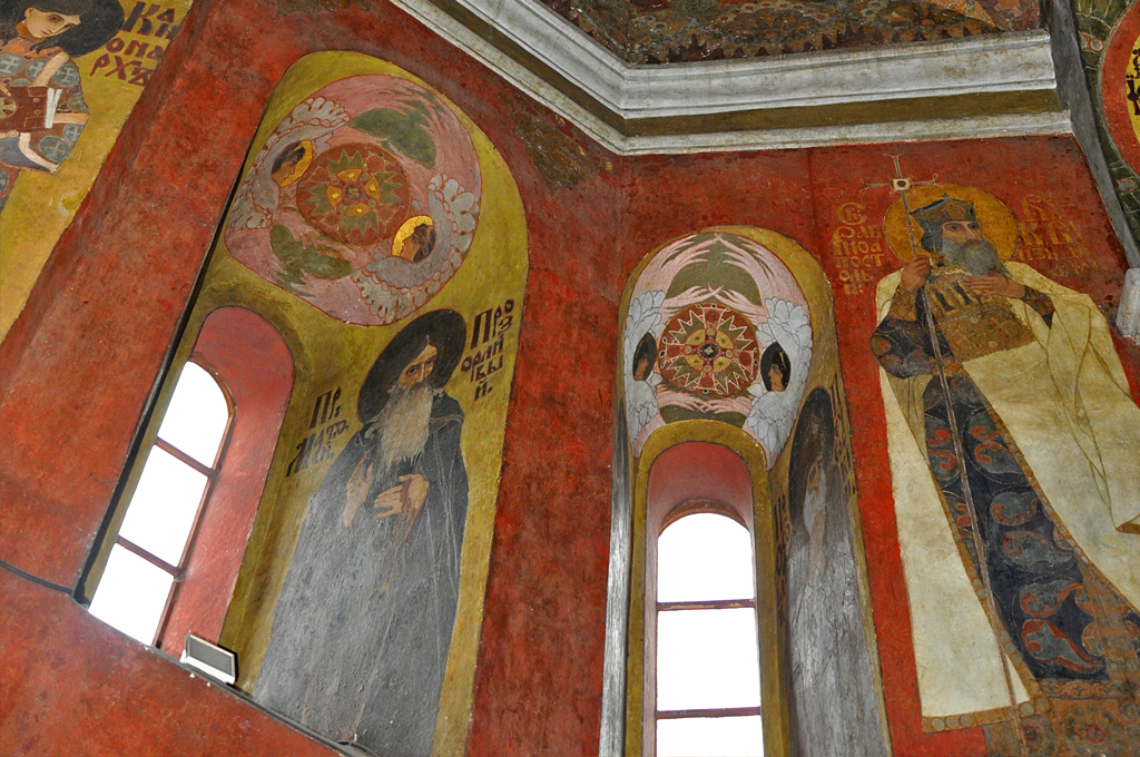 Постать рівноапостольного князя Володимира в розписах Всіхсвятської церкви Києво-Печерської лаври. Церква Всіх Святих Києво-Печерської лаври. Розпис бічного підбанного простору, на скосах вікон — зображення печерських преподобних, на стіні — постать рівноапостольного князя Володимира.